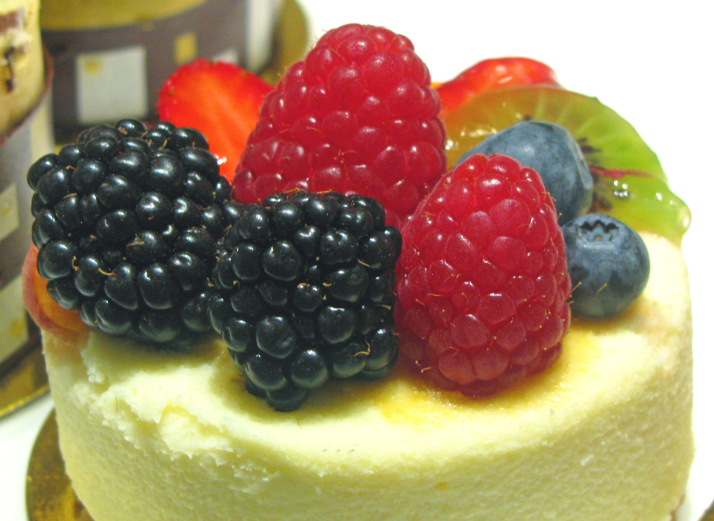 Desert Fruit